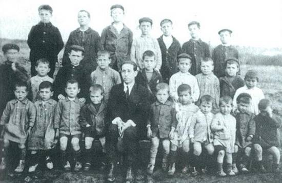 El pastor protestante Simón Vicente con los niños de las escuelas evangélicas.